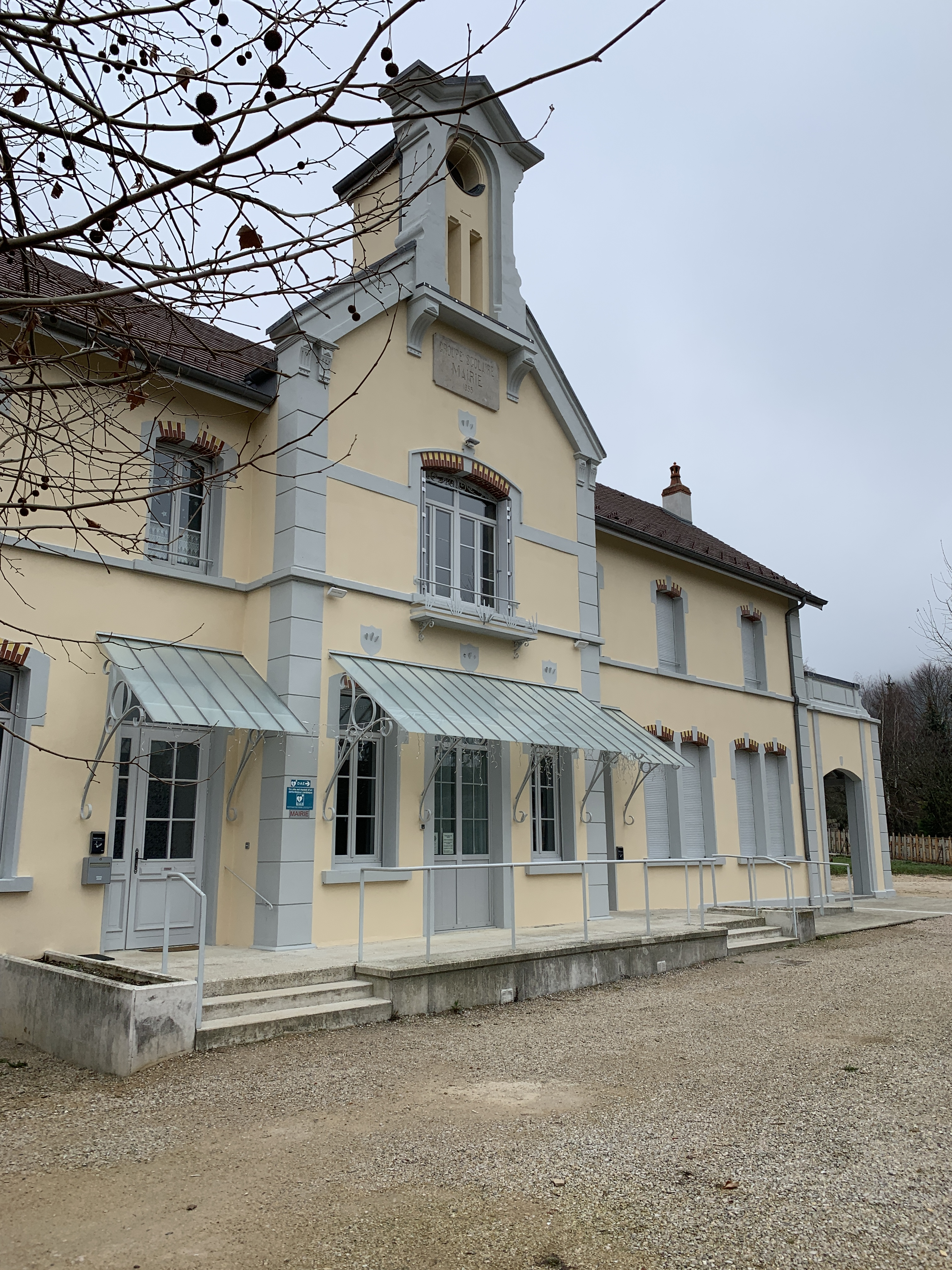 Mairie rénovée